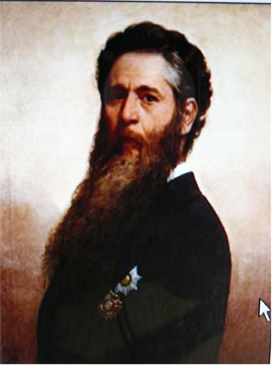 Self-portrait.